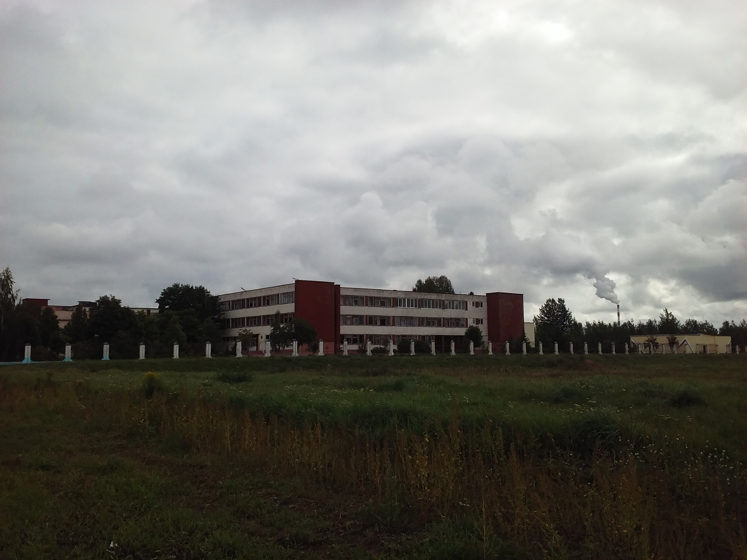 Сярэдняя школа